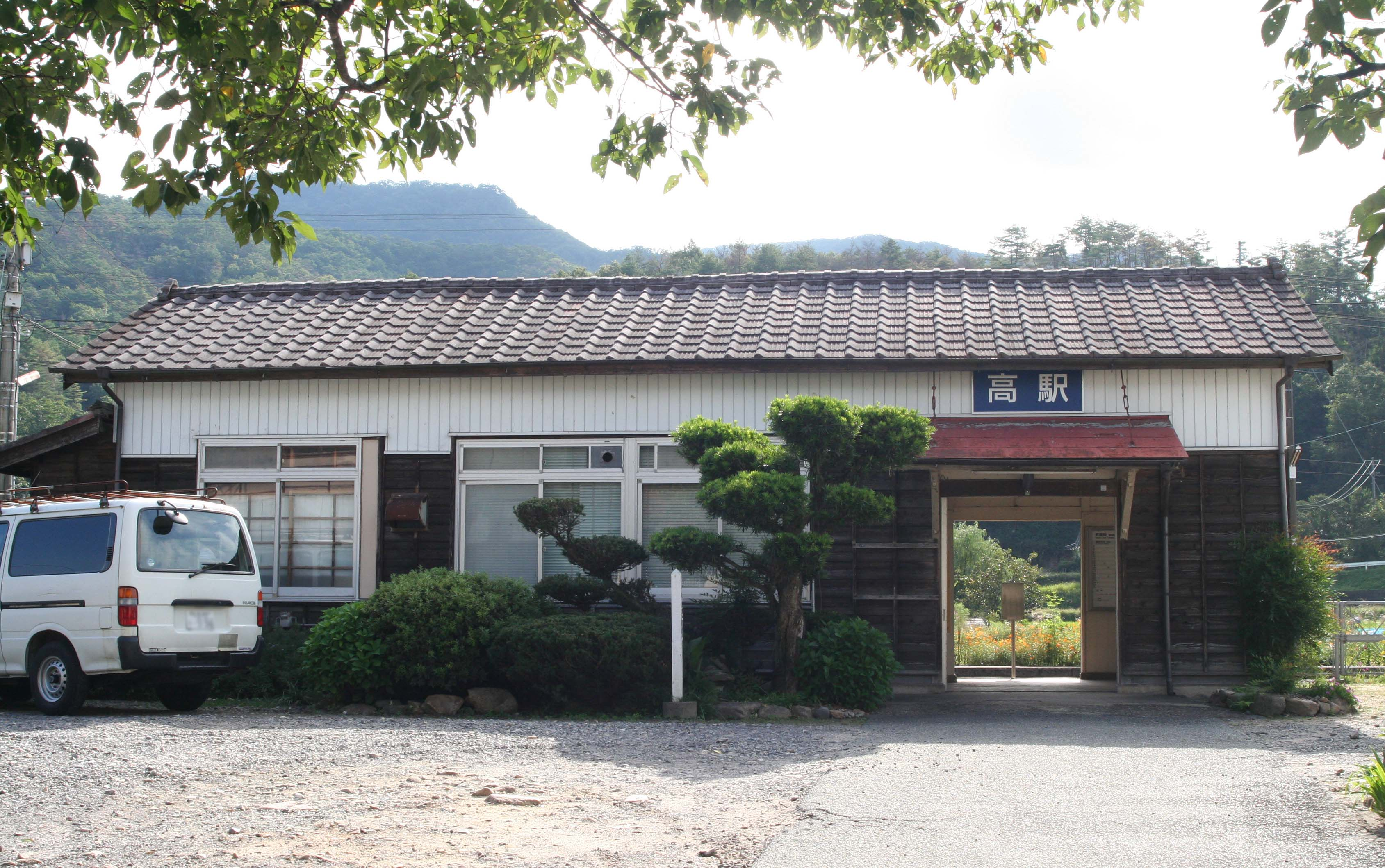 西日本旅客鉄道 高駅の駅舎